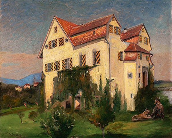 Schloss Senftenau in Lindau